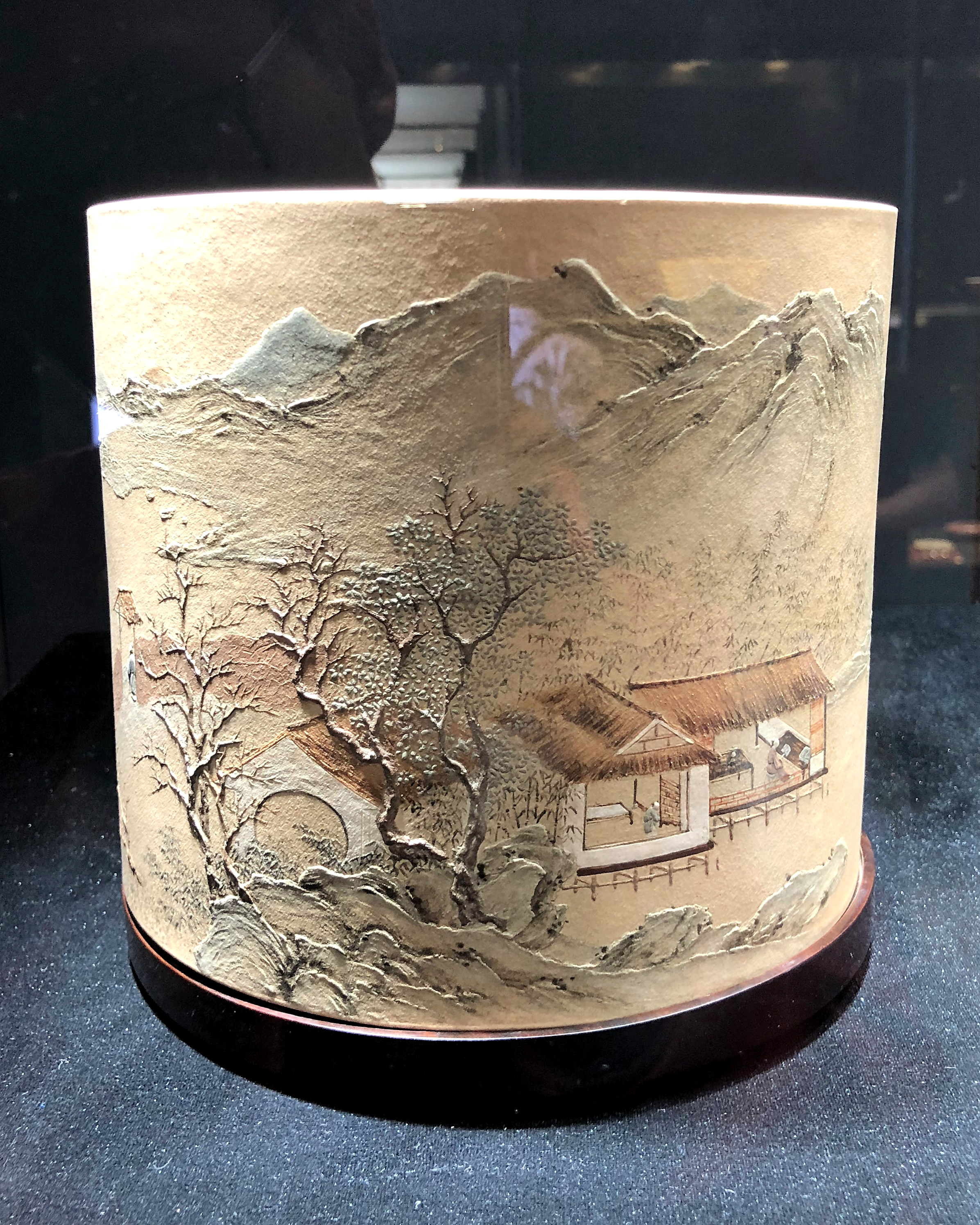 中文（中国大陆）: 清乾隆 杨季初制堆绘春山读书图紫砂笔筒 2018嘉德春拍